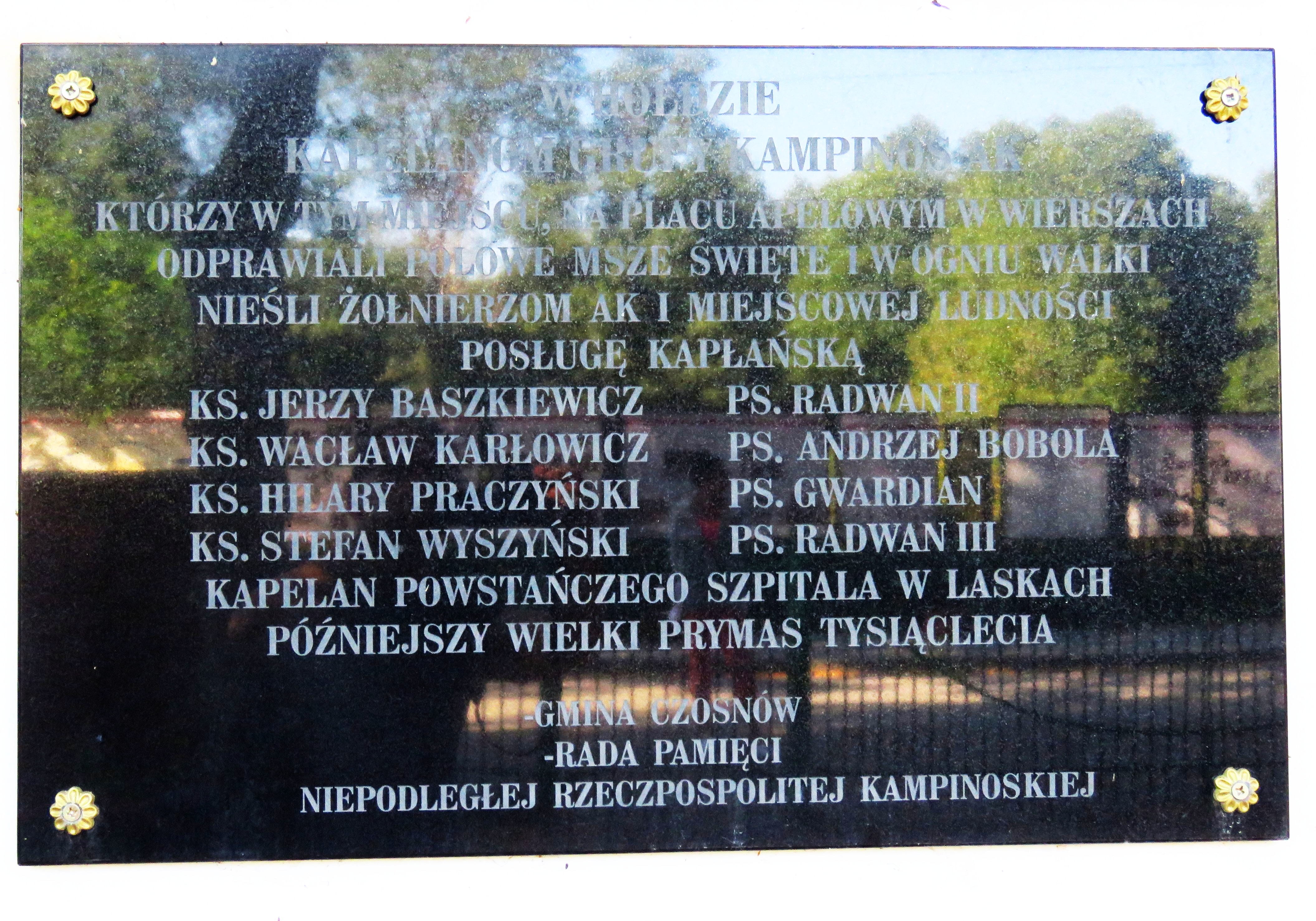 Kościół p.w. Św. Maksymiliana Marii Kolbe TABLICA NA KOŚCIELE 02